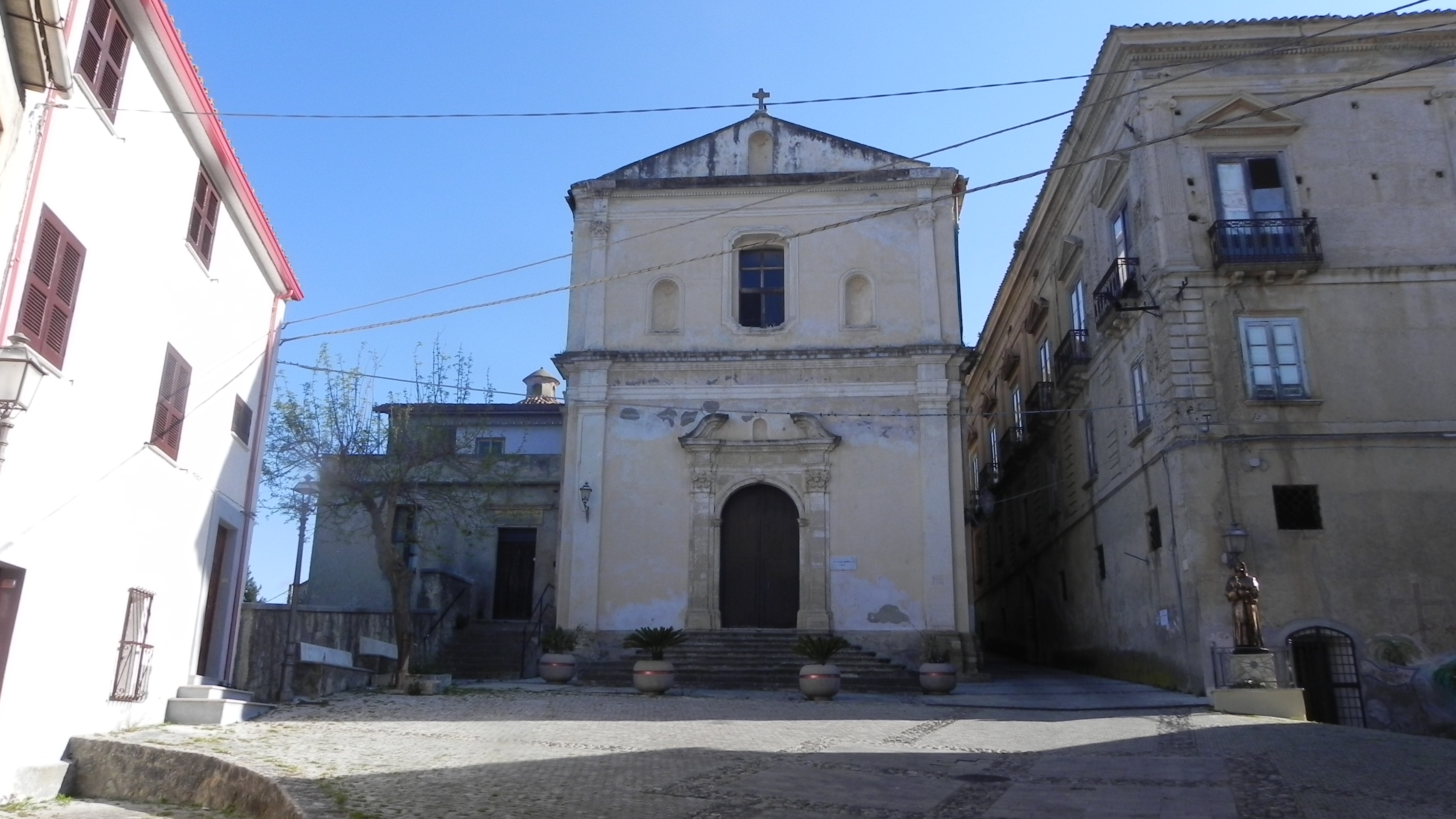 Chiesa di Santa Domenica This is a photo of a monument which is part of cultural heritage of Italy.